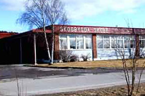 Skogbygda Skole, Barneskole i Skogbygda